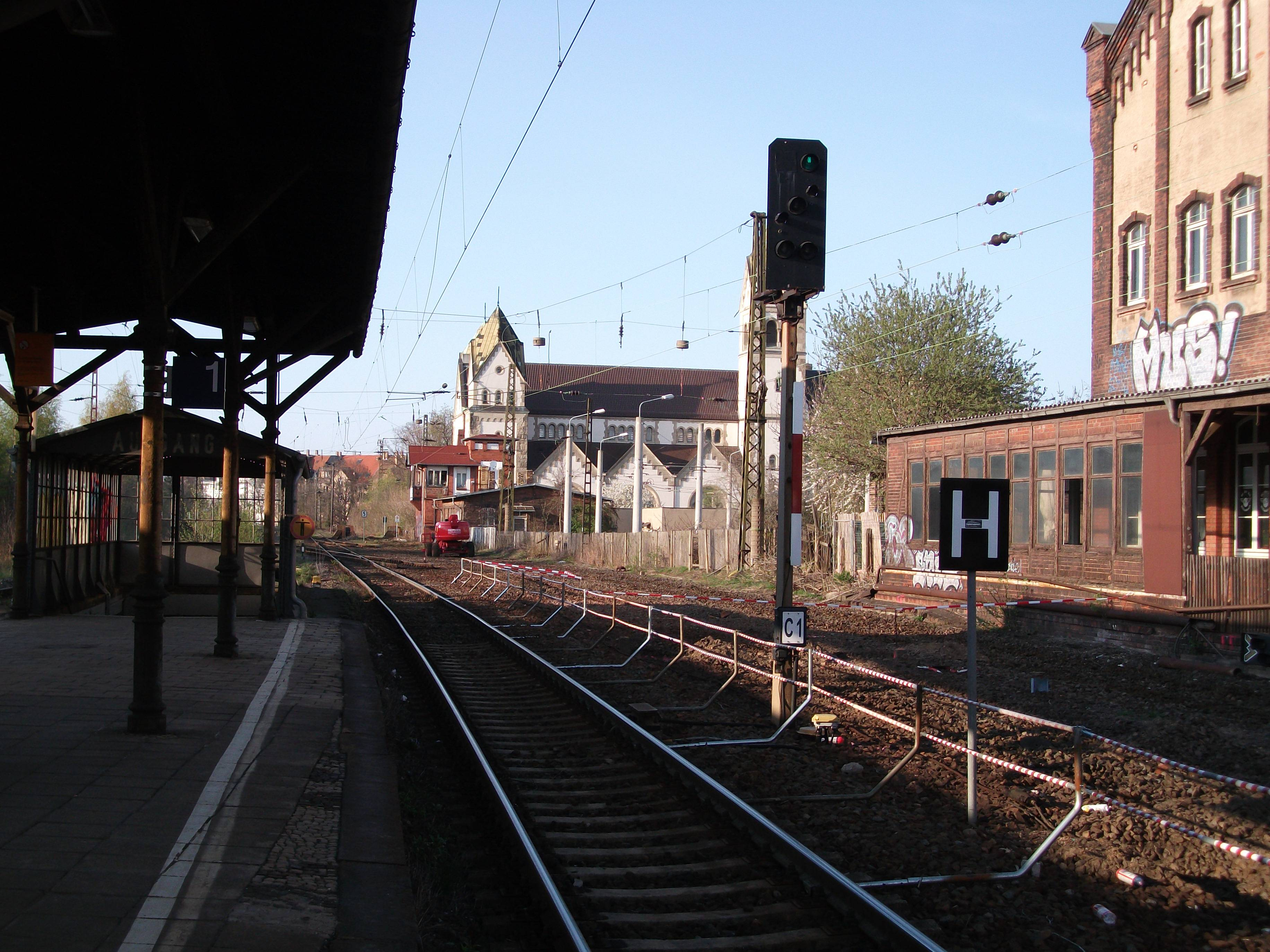 Nordkopf nach Umbaubeginn, die Güterzuggleise sind hier vollständig ausgebaut. Vor der Liebfrauenkirche steht das Stellwerk 1.